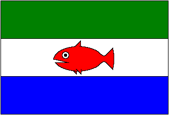 Bandera de las Dependencias Federales de Venezuela